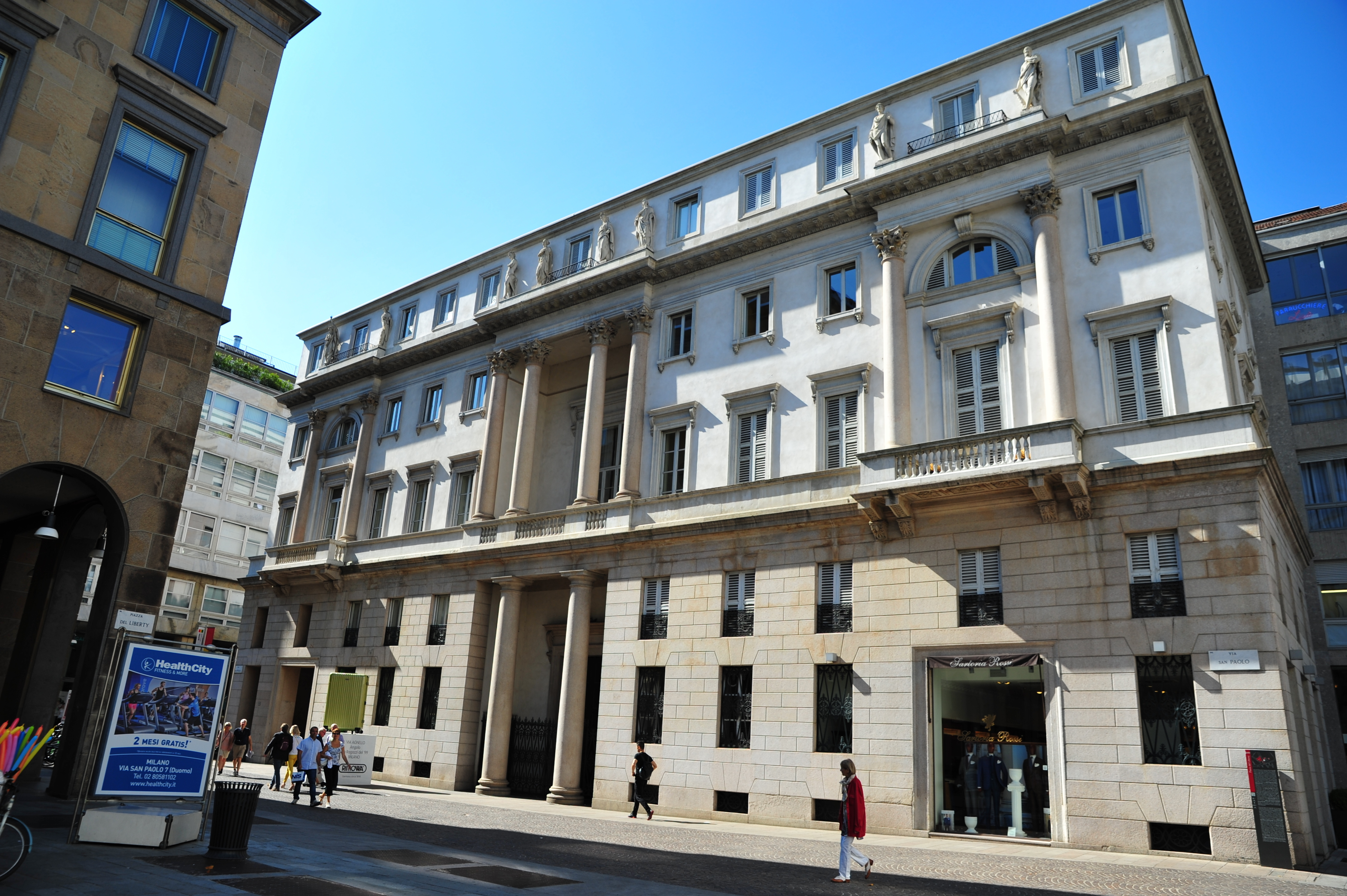 Palazzo Tarsis This is a photo of a monument which is part of cultural heritage of Italy.